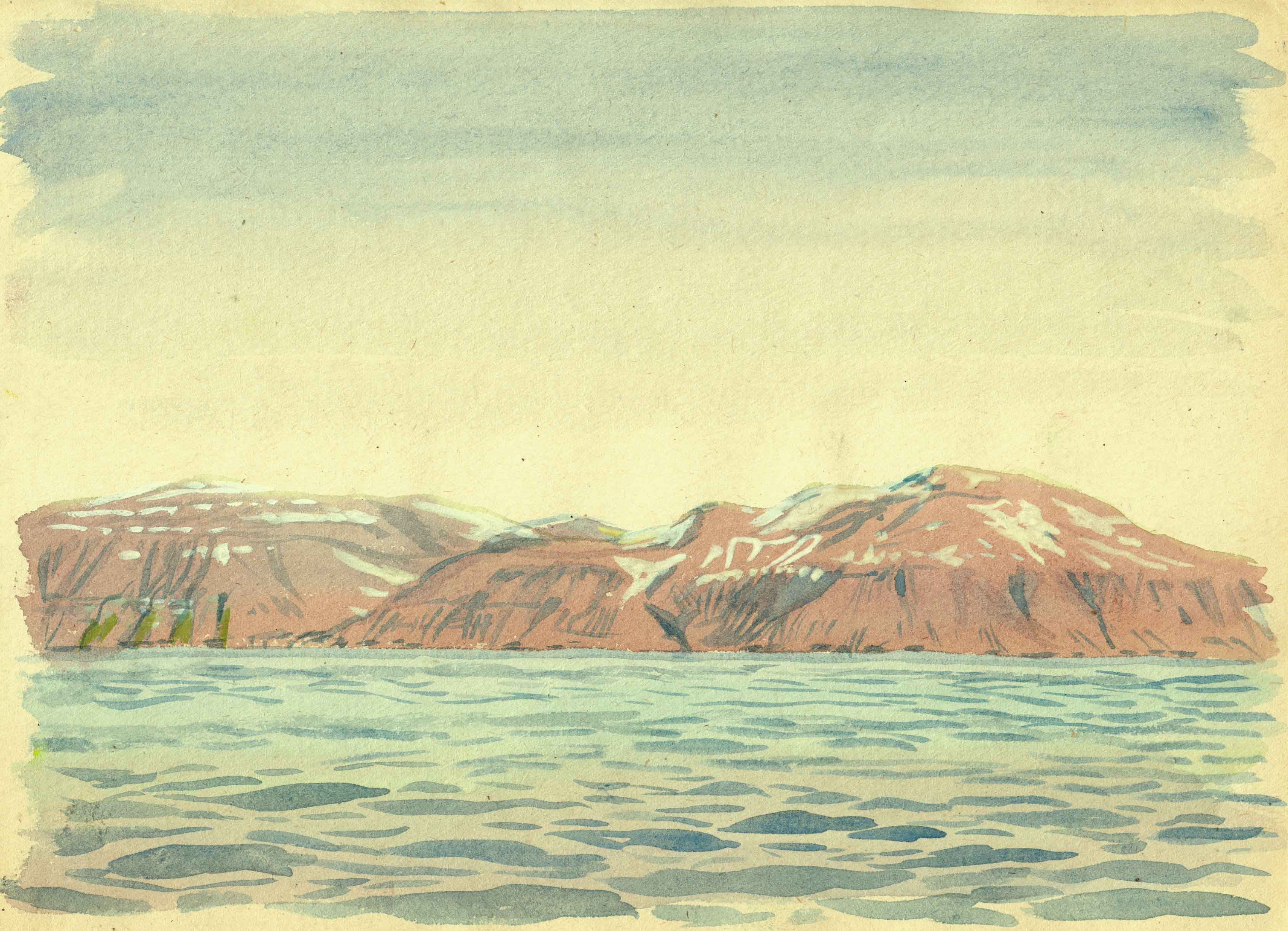 Мемориальная изба исследователя Арктики Русанова находится в правой части пейзажа на нижней береговой террасе. Не видна из-за сильного удаления. Сделана работа во время участия в международной экспедиции Михаила Малахова "Полярный меридиан. Щпицберген-2014" с борта яхты Пролифик.